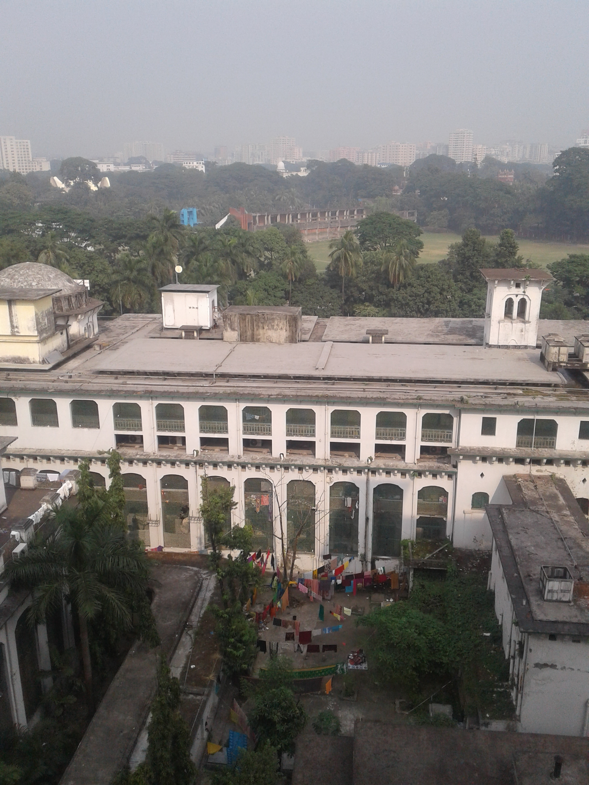 হাসপাতালের এলাকার একাংশ